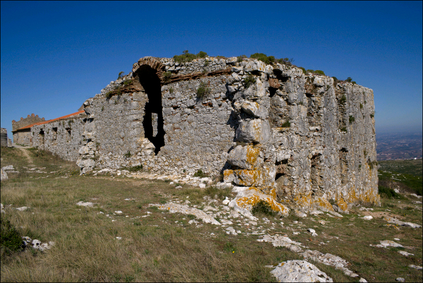 Convento Dominicano de Nossa Senhora das Neves, séc. XVII